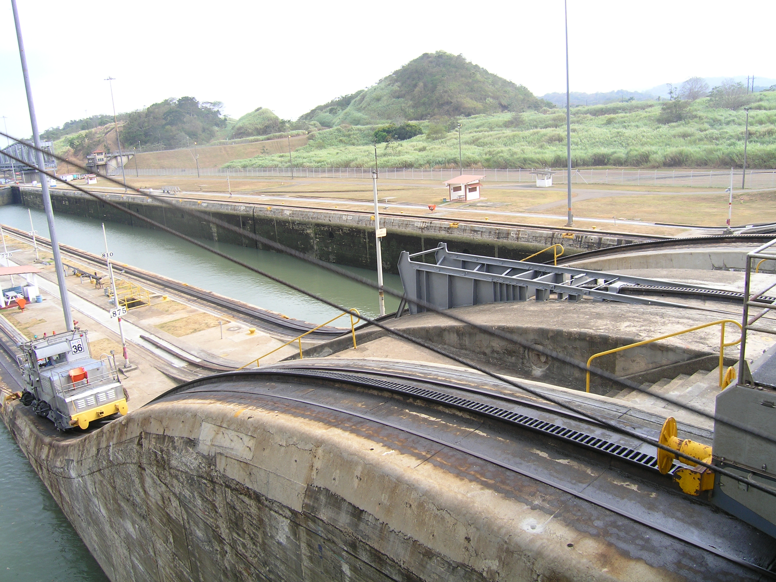 Panama csatorna fogaskerekű mozdonya vontatja át a hajókat a zsilipeken